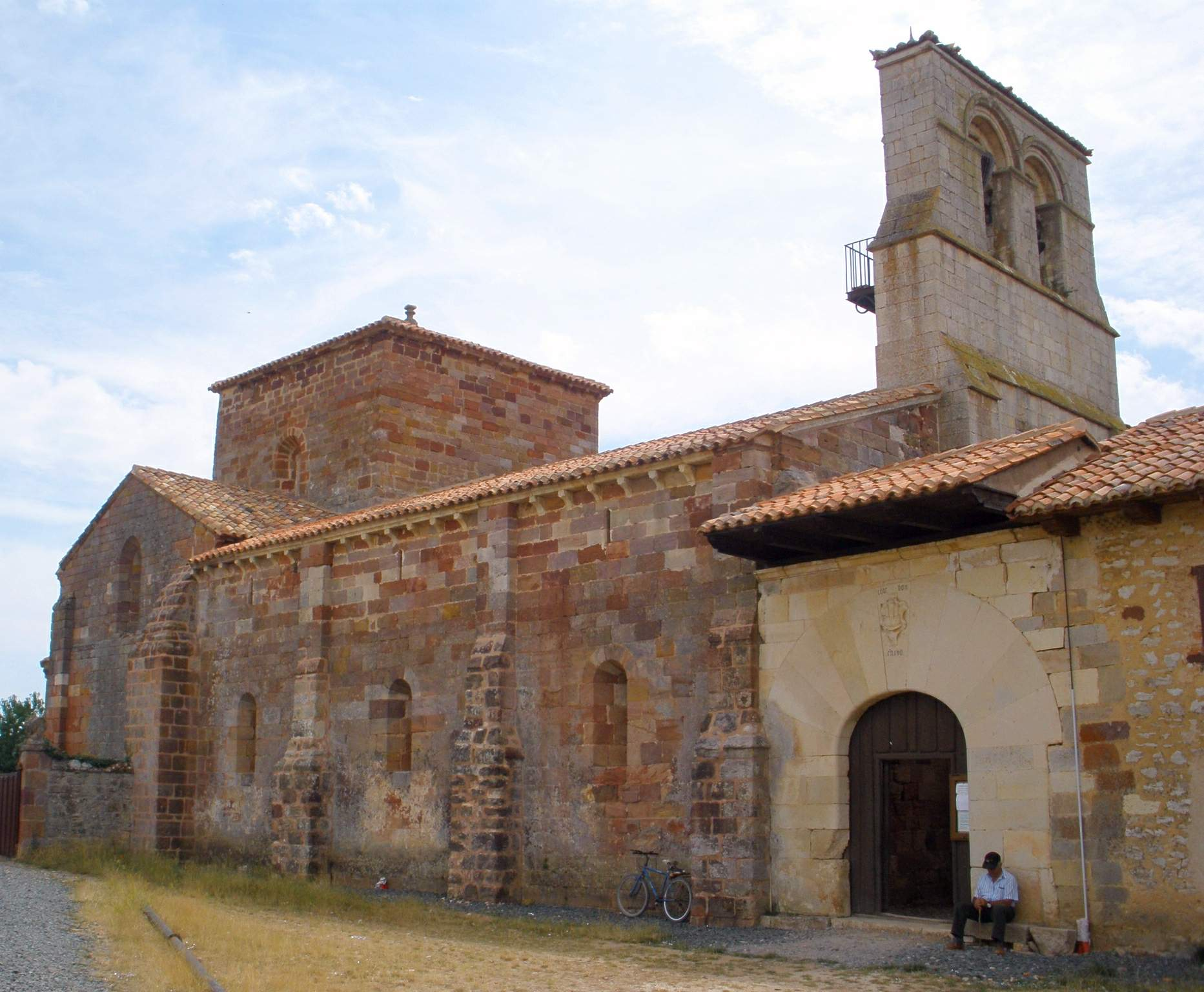 Monasterio de Santa María la Real, Mave (Palencia)